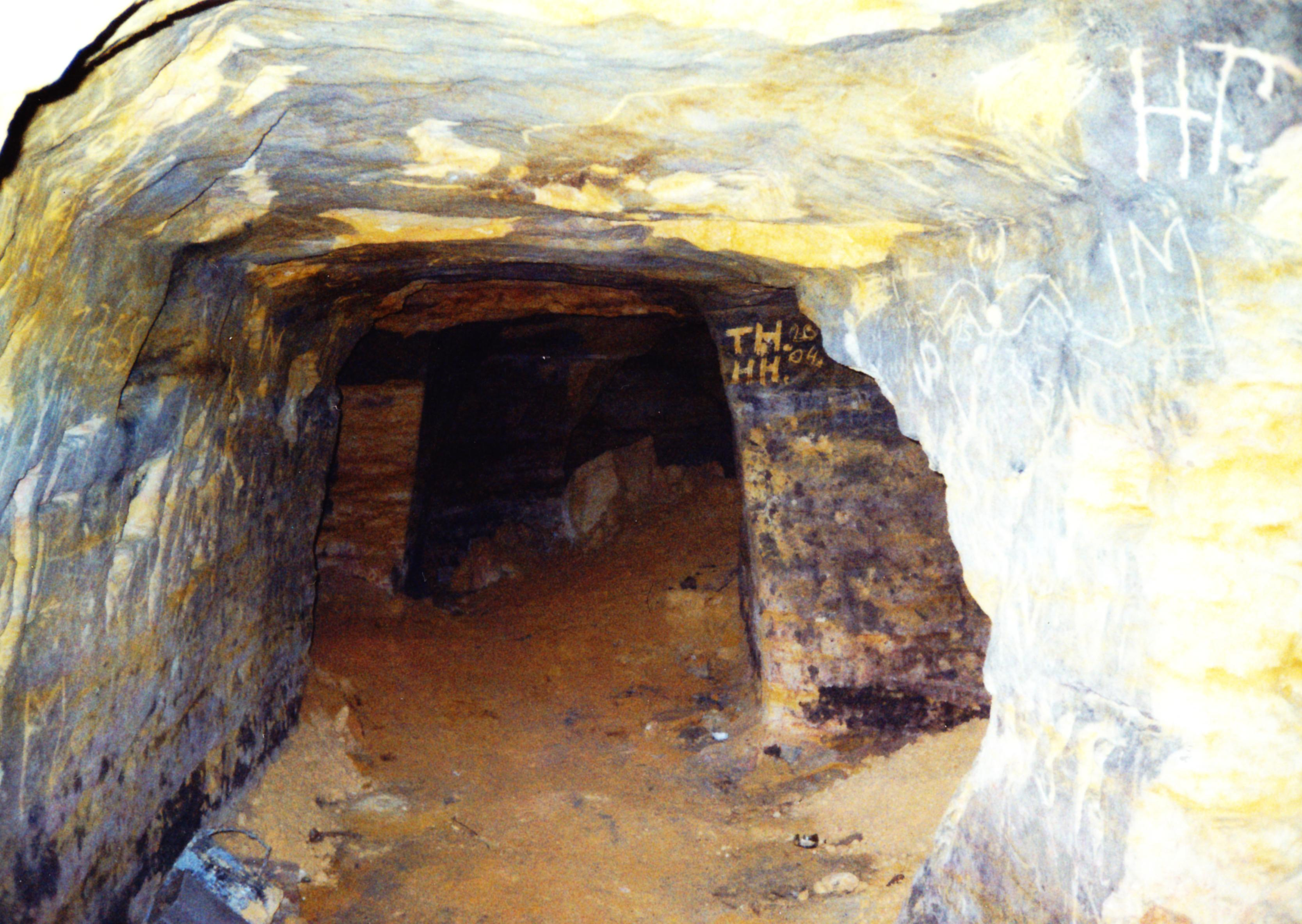 Jirkov - Staré pivovarské sklepy